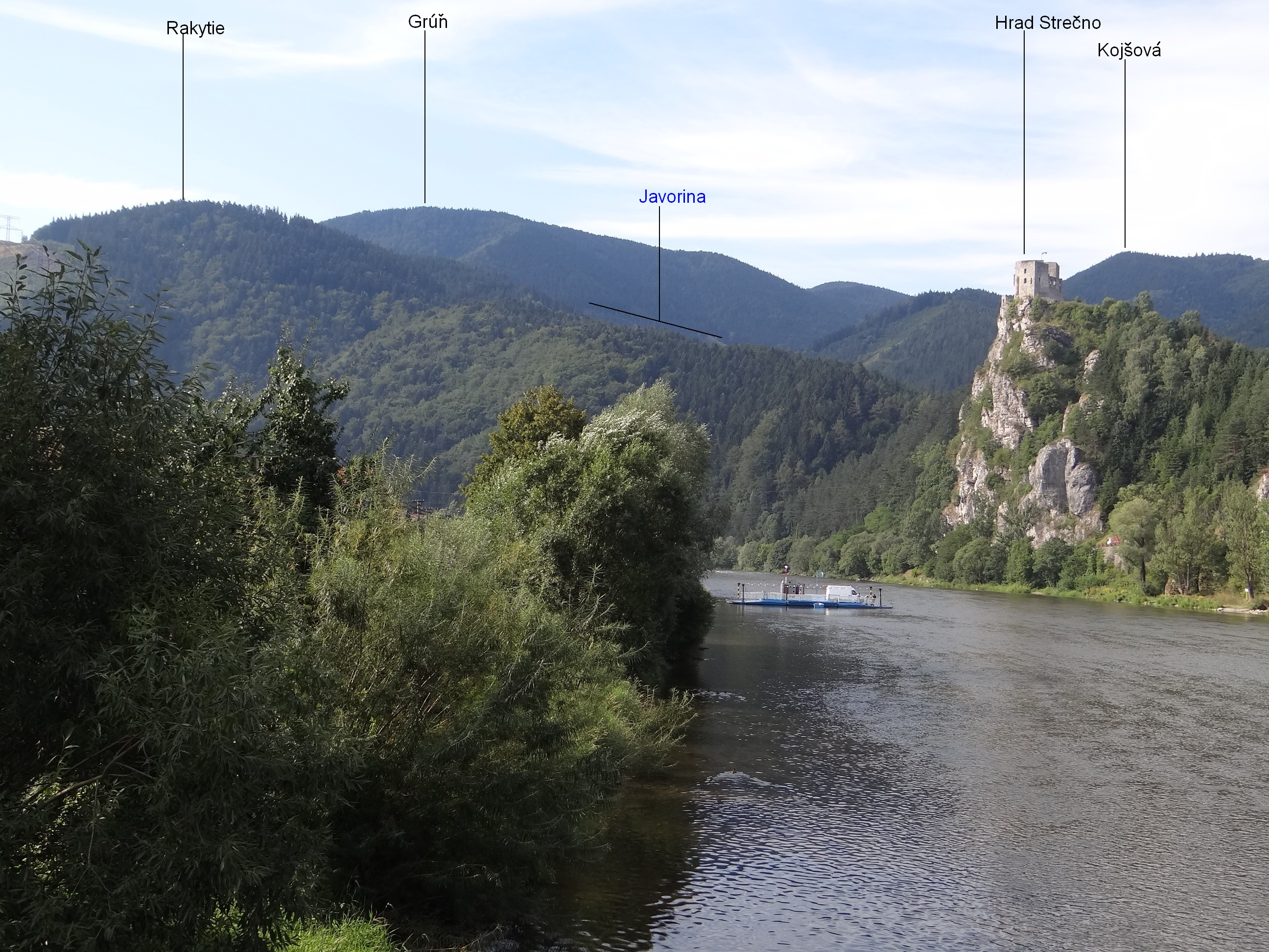 Strečno Castle